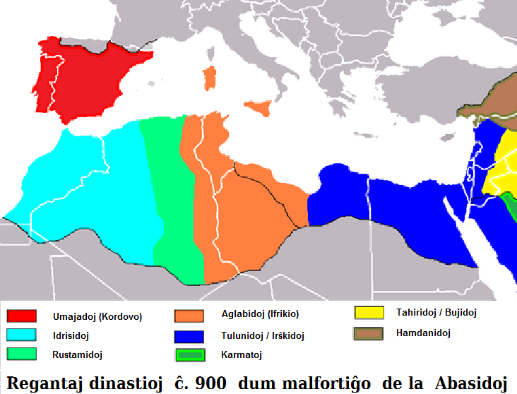 mapo pri la regantaj dinastioj de Norda Afriko ĉ. 900